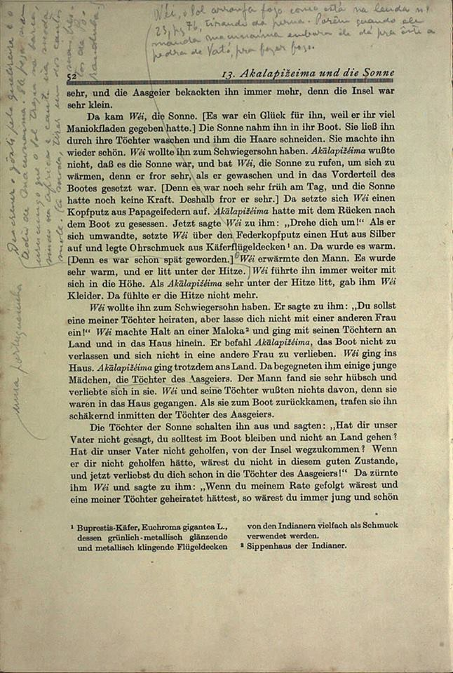 Anotação de Mário de Andrade em Vom Roraïma zum Orinoco